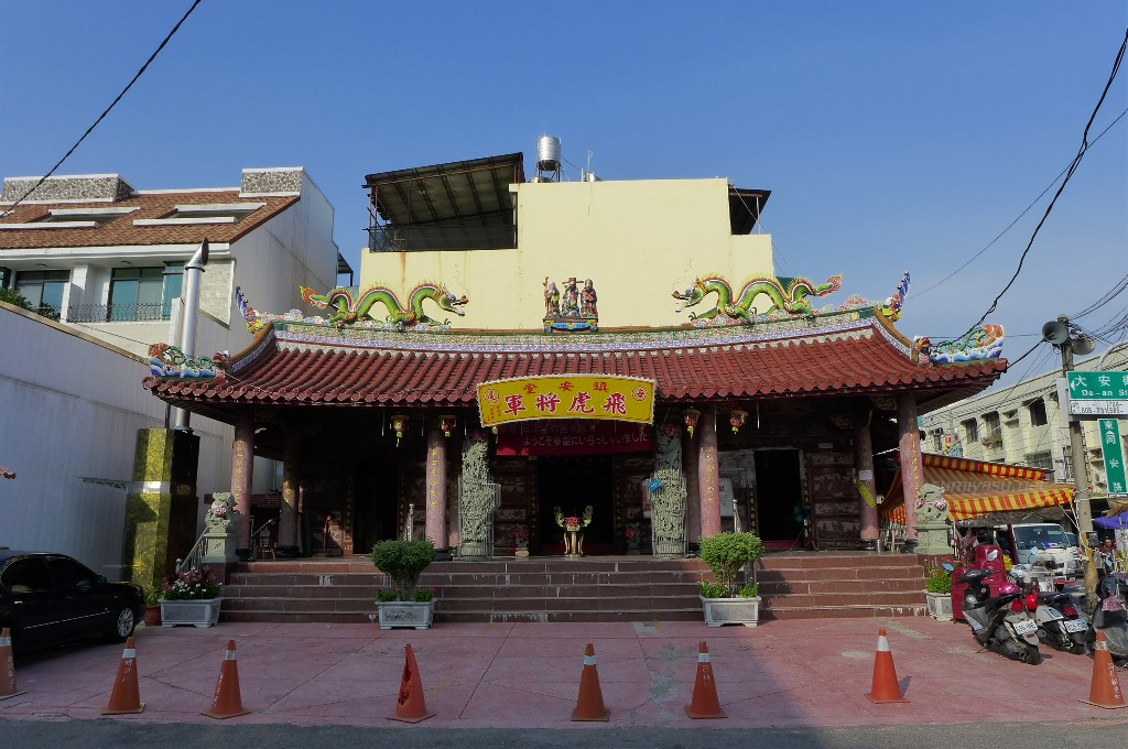 鎭安堂飛虎将軍廟の外観